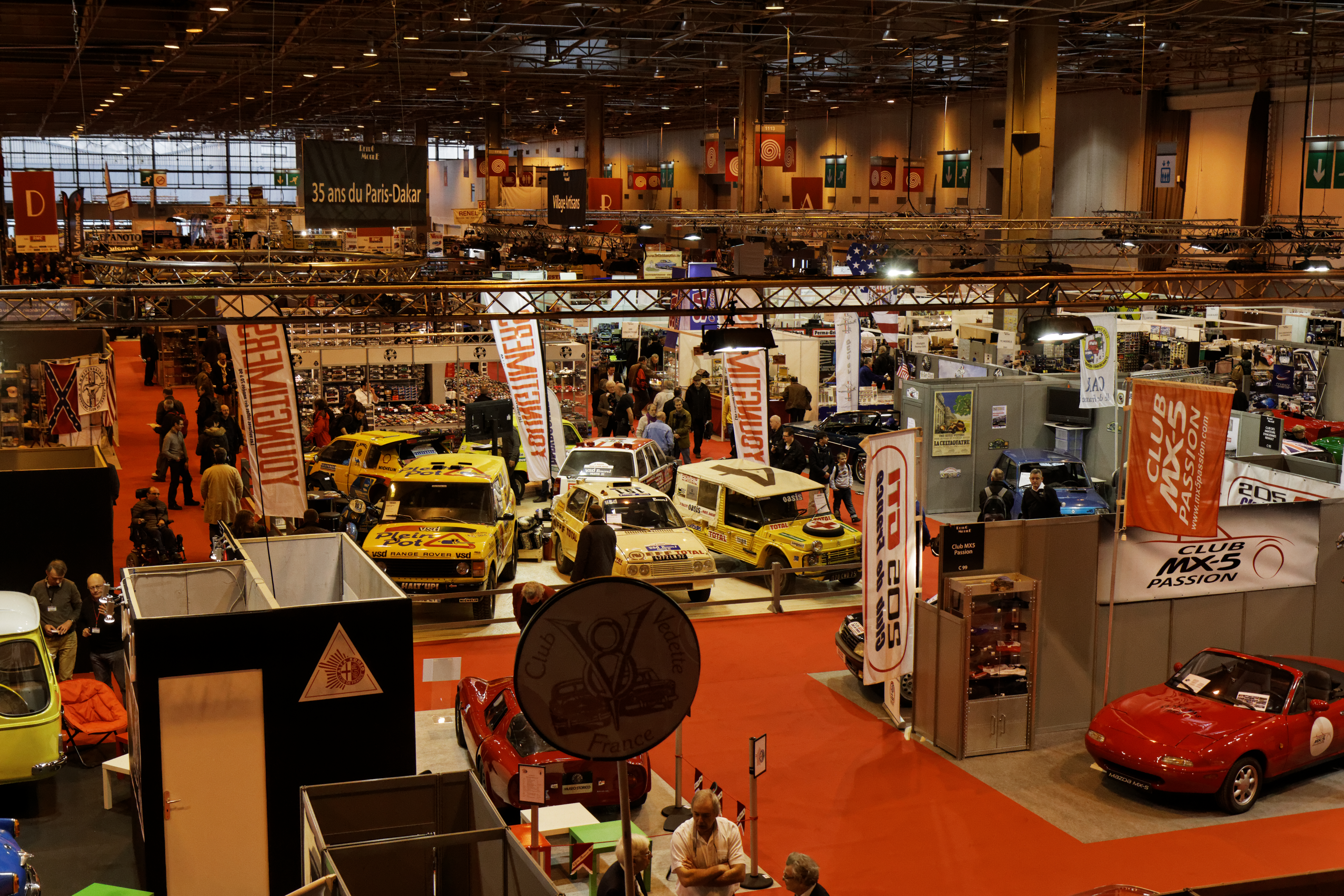 Vue du salon Retromobile 2014.